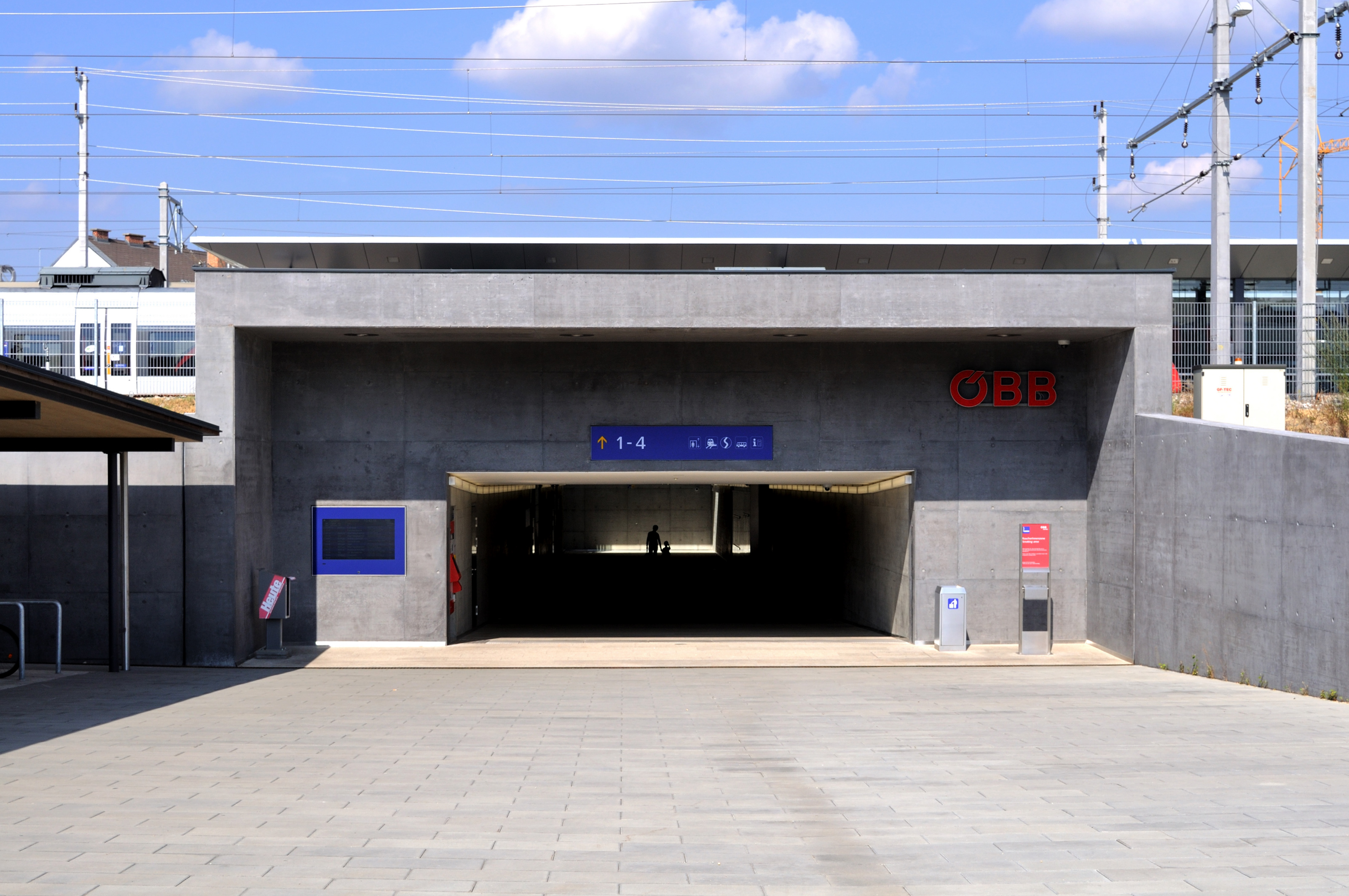 Südlicher Zugang vom Parkplatz zur Unterführung am Bahnhof Bruck an der Leitha